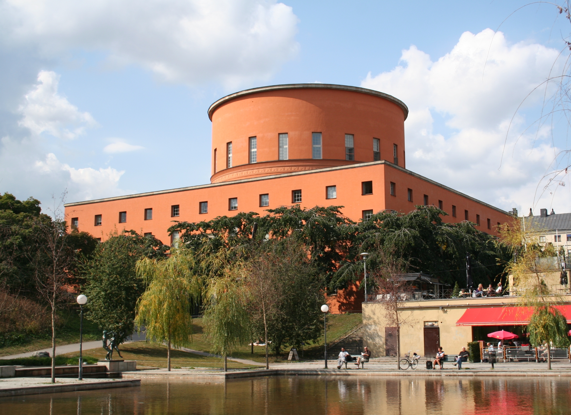 Gunnar Asplund, Bibliothèque, Stockholm